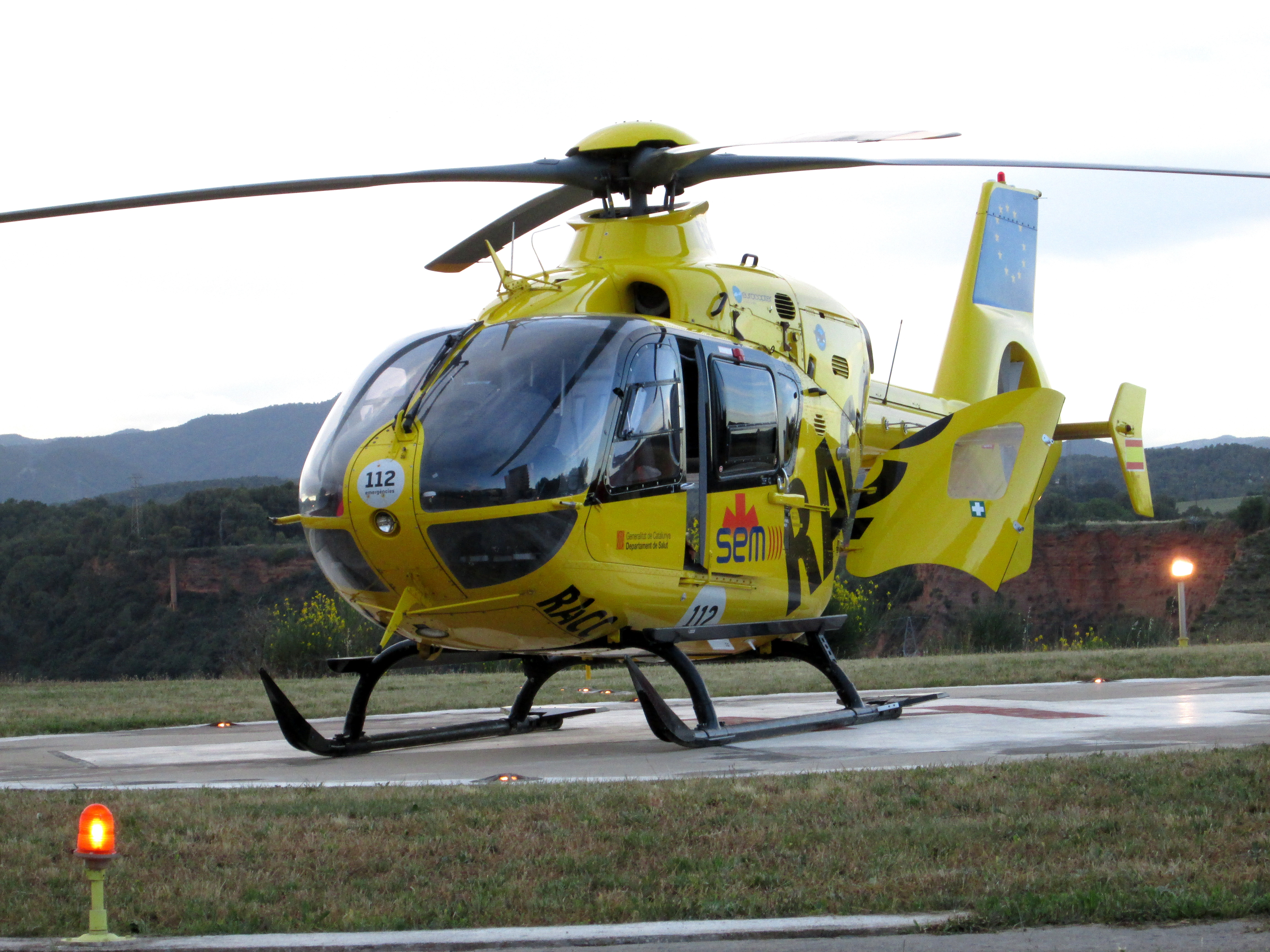 Helicóptero del SEM (Sistema de Emergencias Médicas) en el helipuerto del Hospital de Sabadell.